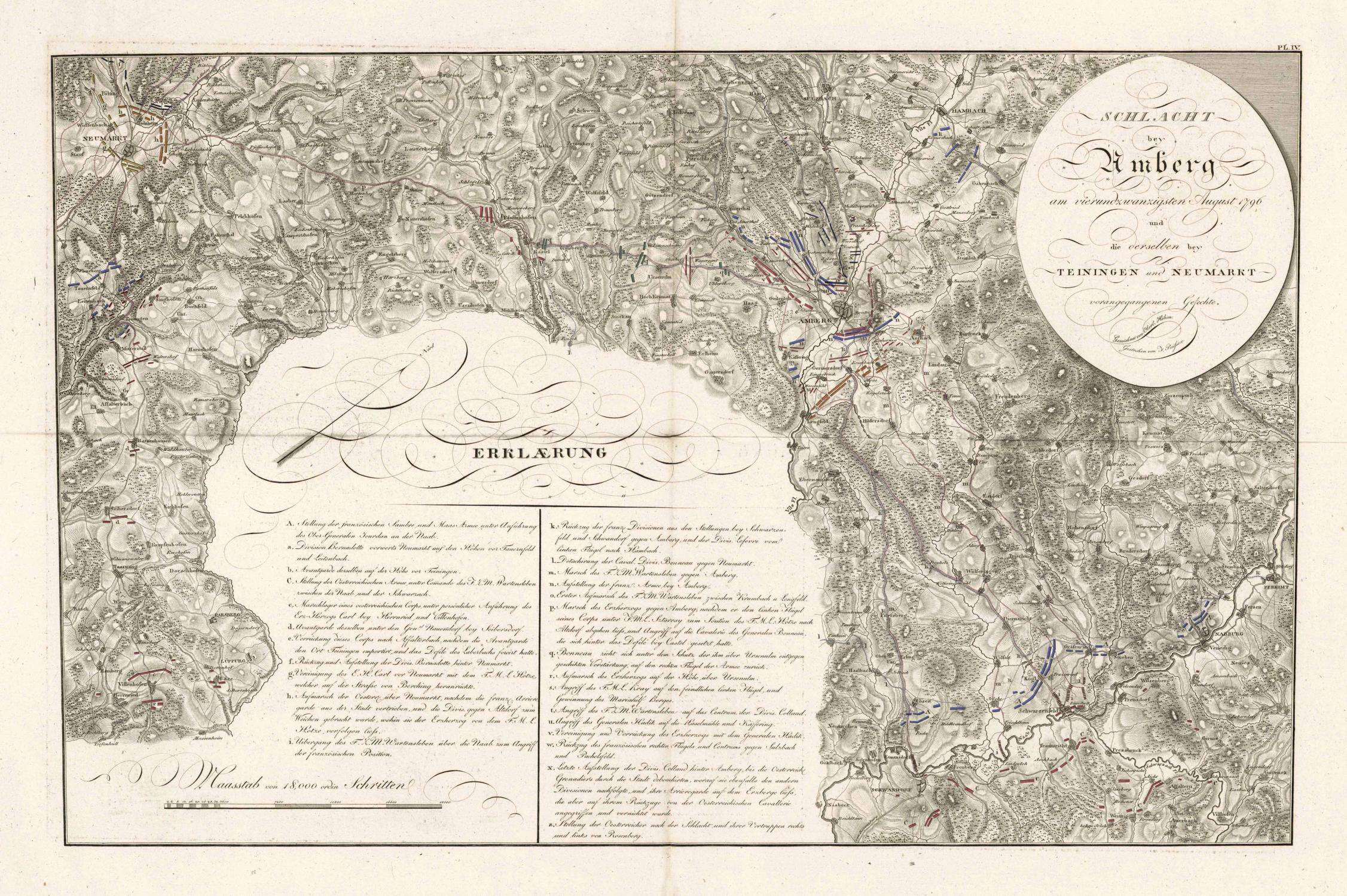 Karte der Schlachten bei Deining und Amberg in der Oberpfalz, eine Auseinandersetzung de Ersten Koalitionskrieges um den 22.-24. August 1796 zwischen französischen Revolutionstruppen und kaiserlich-österreichische Einheiten.